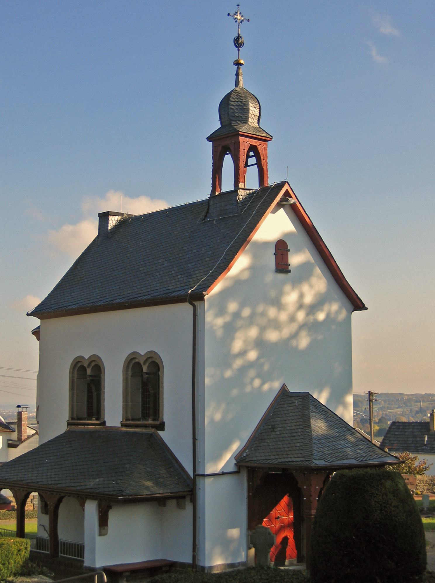 Friedhofskapelle, alter Bergfriedhof in Merten, Stadt Bornheim